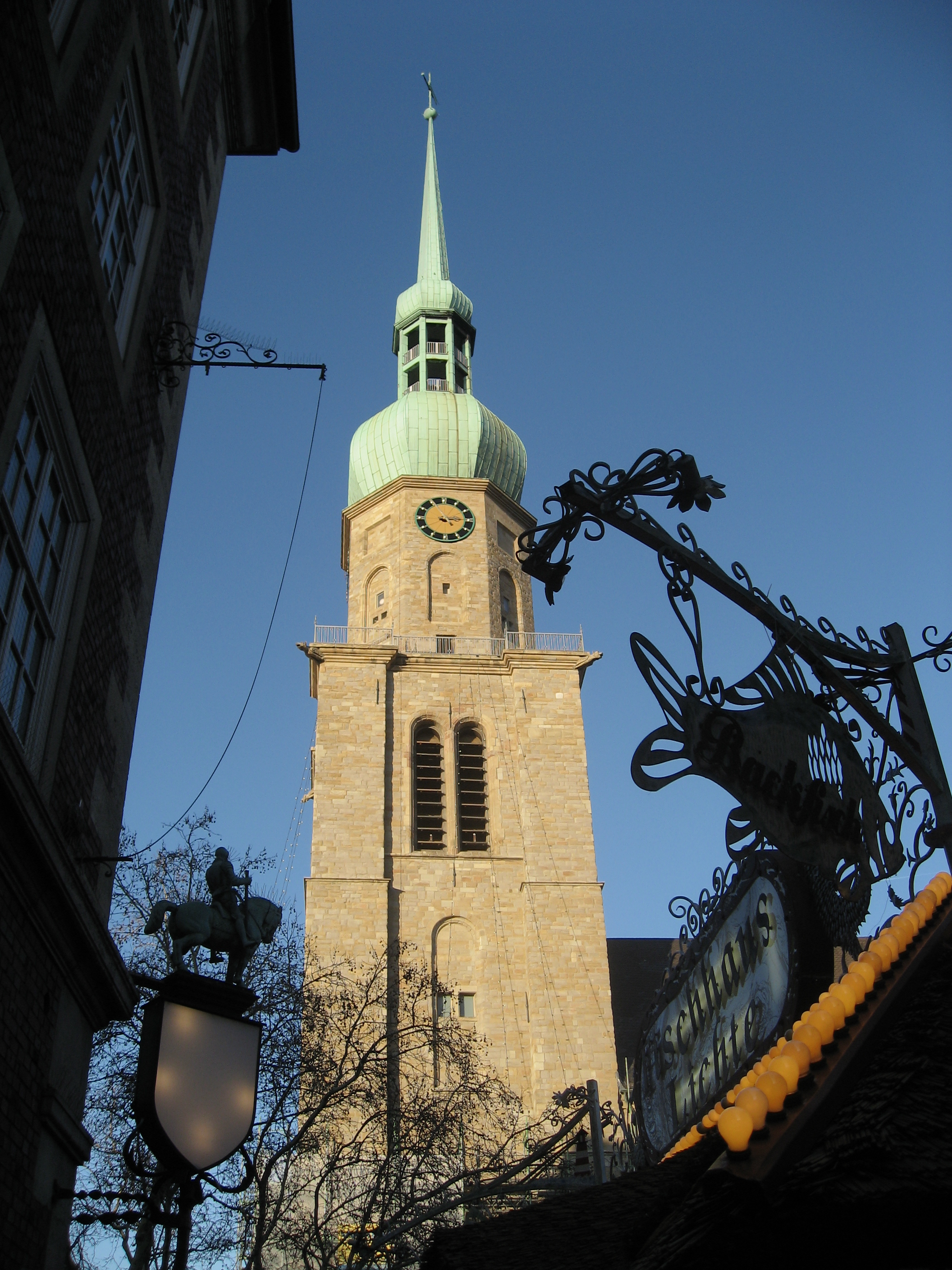 Dortmund, Turm der Reinoldikirche. Object location51° 30′ 53″ N, 7° 28′ 02″ E